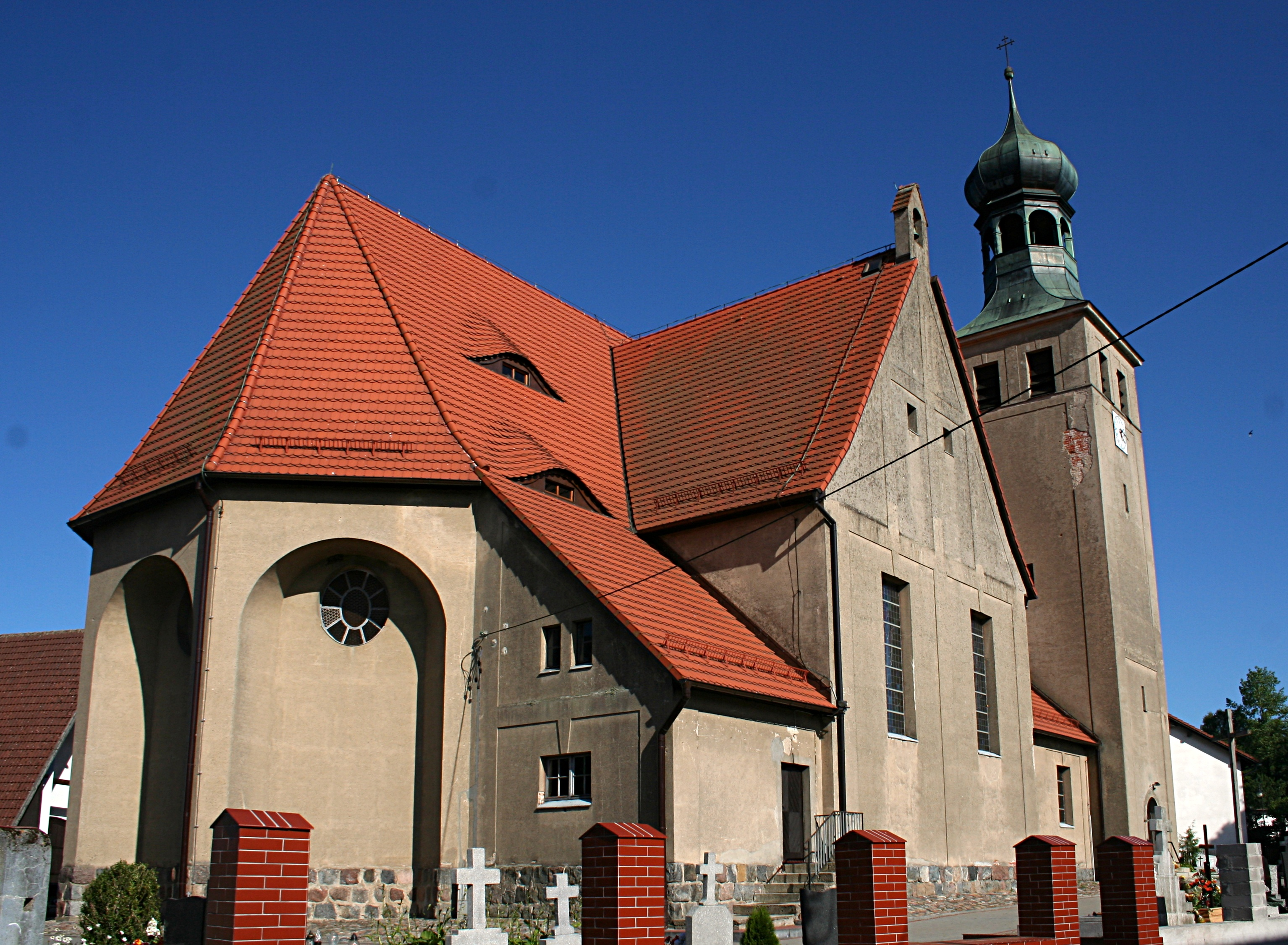 Kościół św. Barbary w Swornegaciach